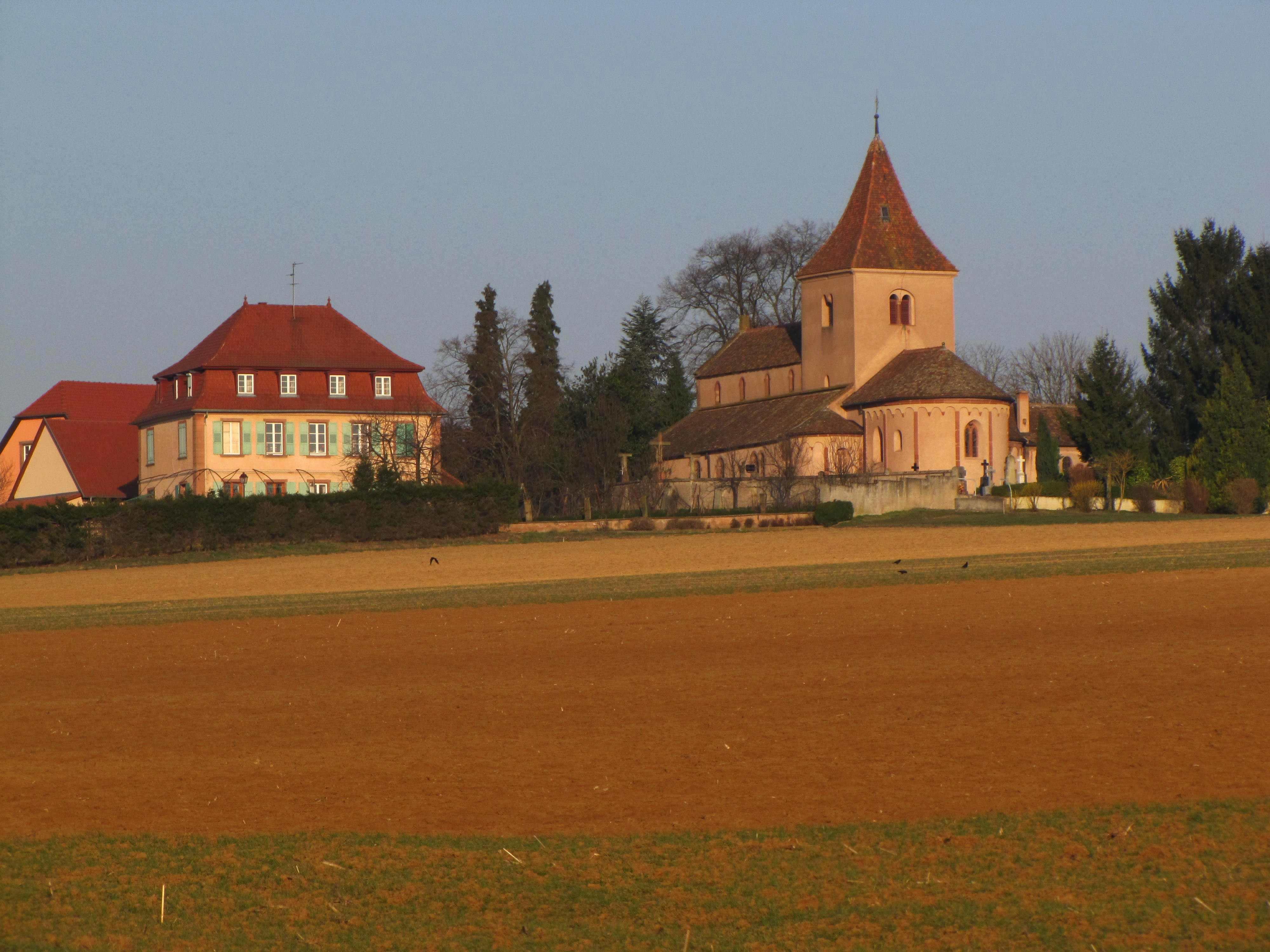 Alsace, Bas-Rhin, Église Saints-Pierre-et-Paul de Hohatzenheim (PA00084751, IA67009140).